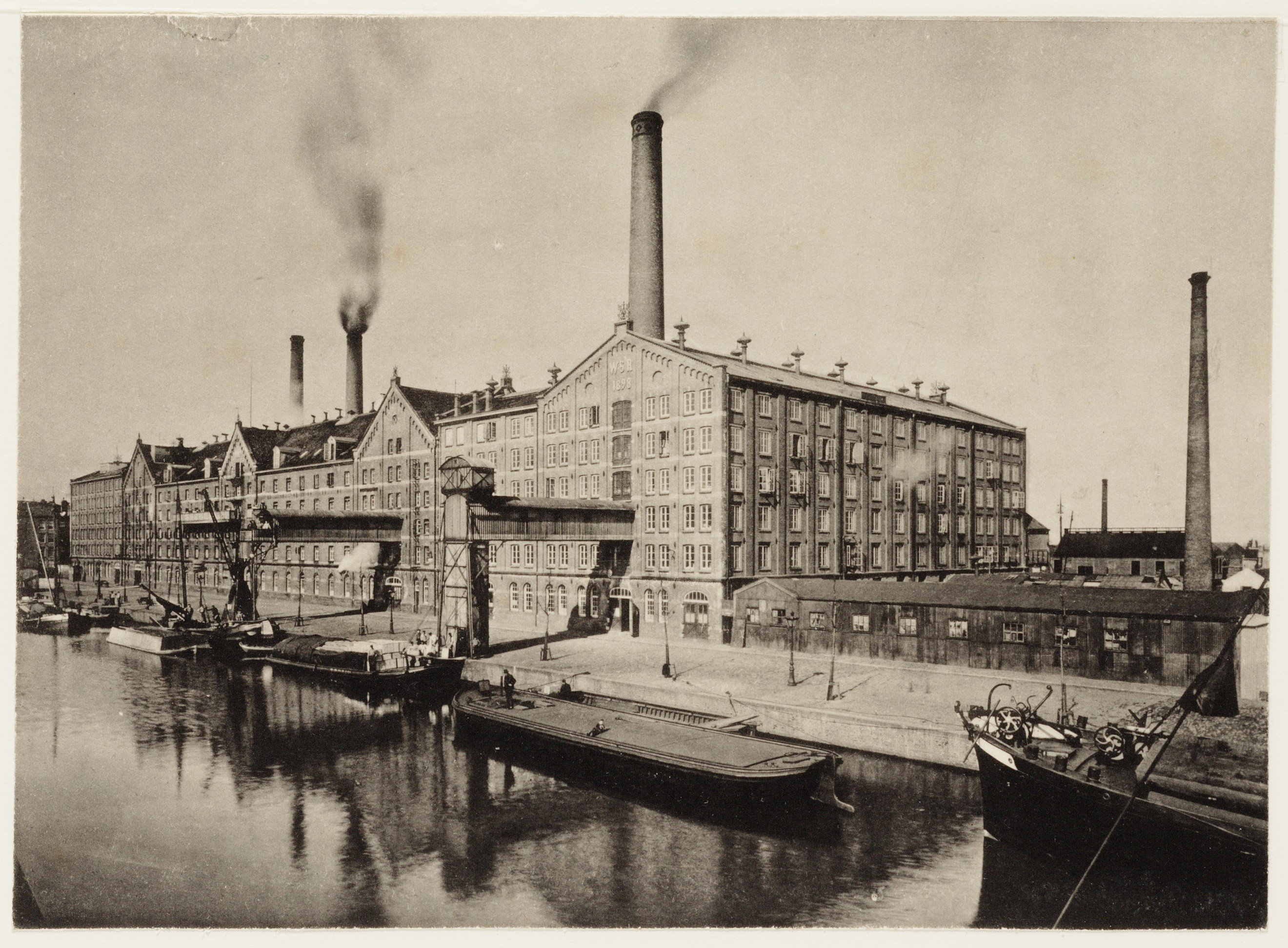 Beschrijving: Van Noordtkade 20De Wester Suikerraffinaderij.Documenttype: fotoCollectie: Collectie Stadsarchief Amsterdam: foto-afdrukkenGeografische naam: Van NoordtkadeInventarissen: OSIM00003005144